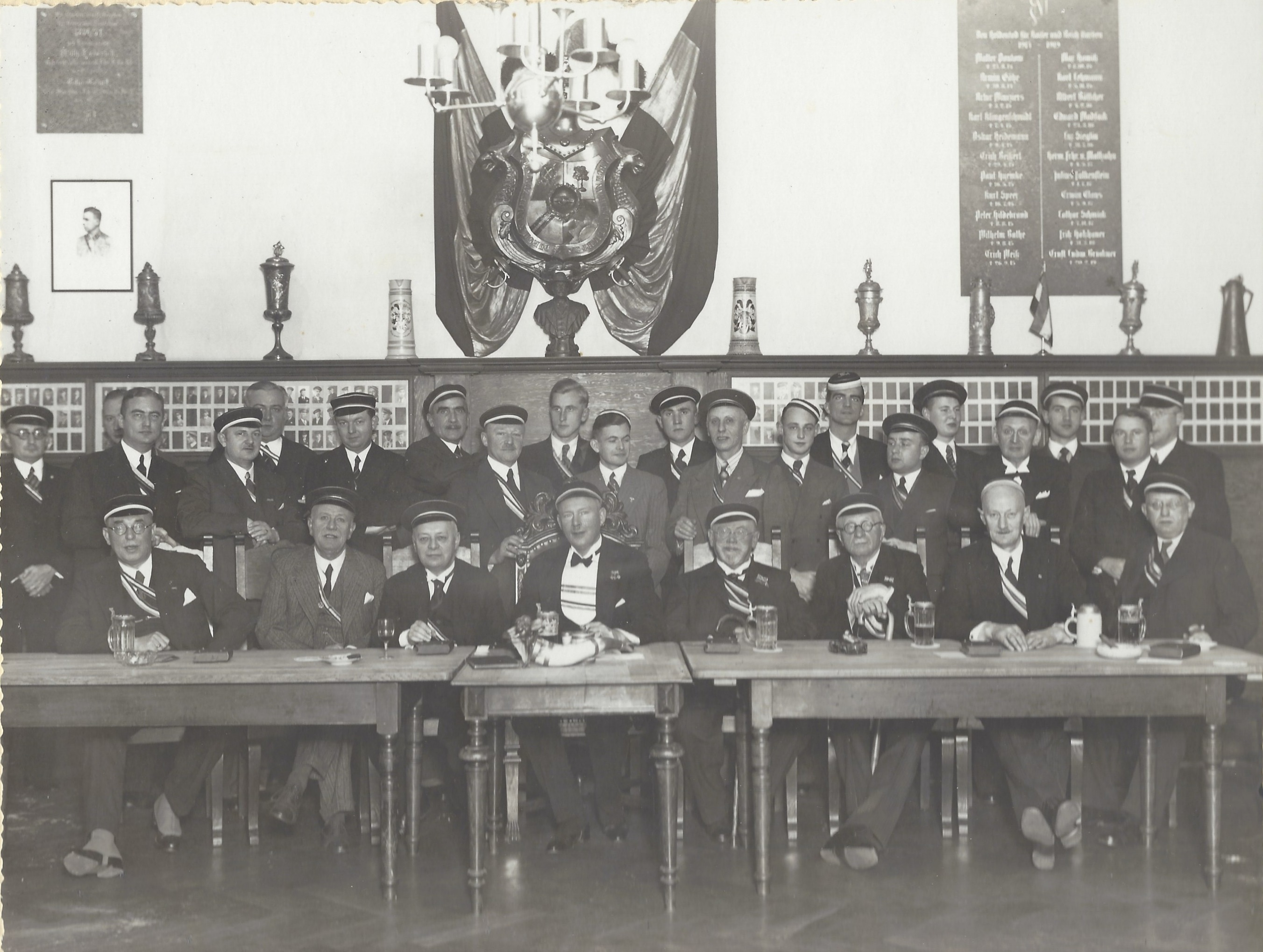 Angehörige des Corps Frankonia Prag und der Wassersportlichen Vereinigung Alter Corpsstudenten auf dem Corpshaus der Normannia Berlin. Vorn in der Mitte Werner Sporleder.